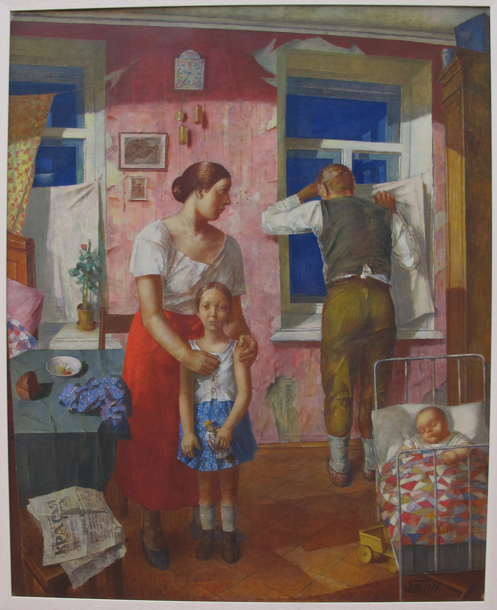 Kuzma petrov-vodkin, 1919 allarme, 1934